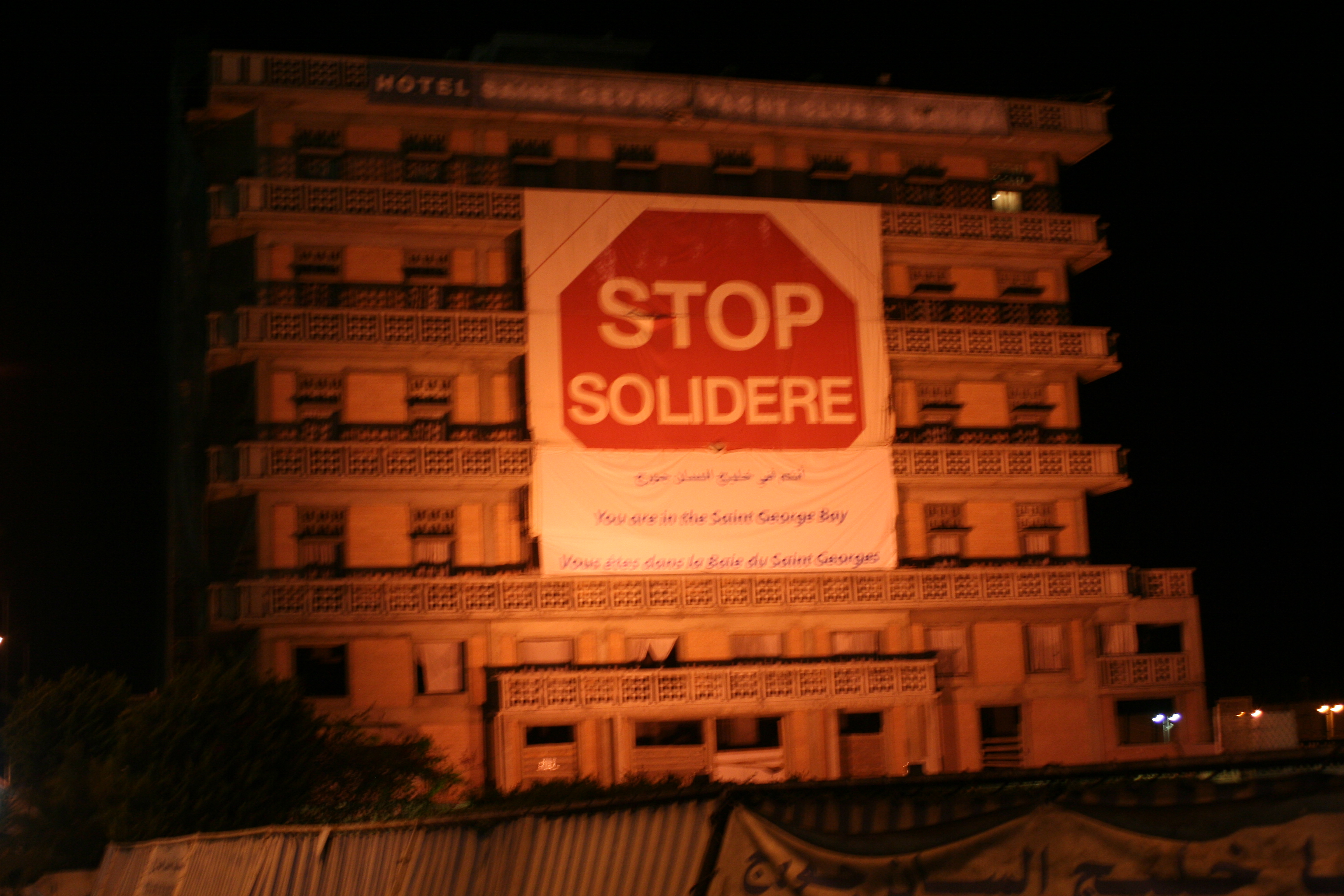 يافطة على فندق في على ساحل بيروت مناهضة لمشروع السوليدير